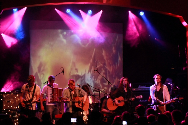 Исландская инди-фолк группа Of Monsters and Men